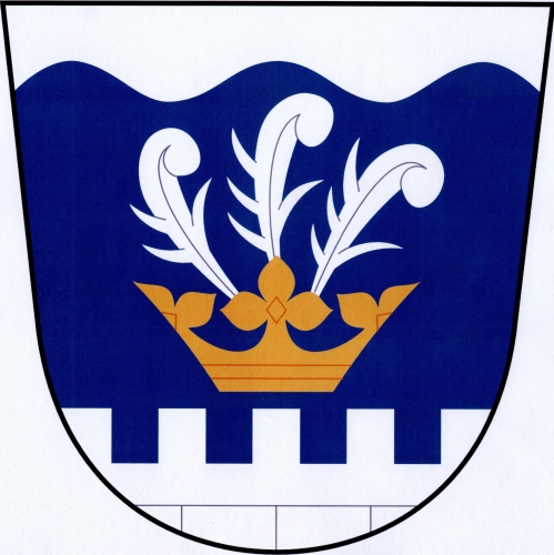 znak, Oslavička, okres Žďár nad Sázavou